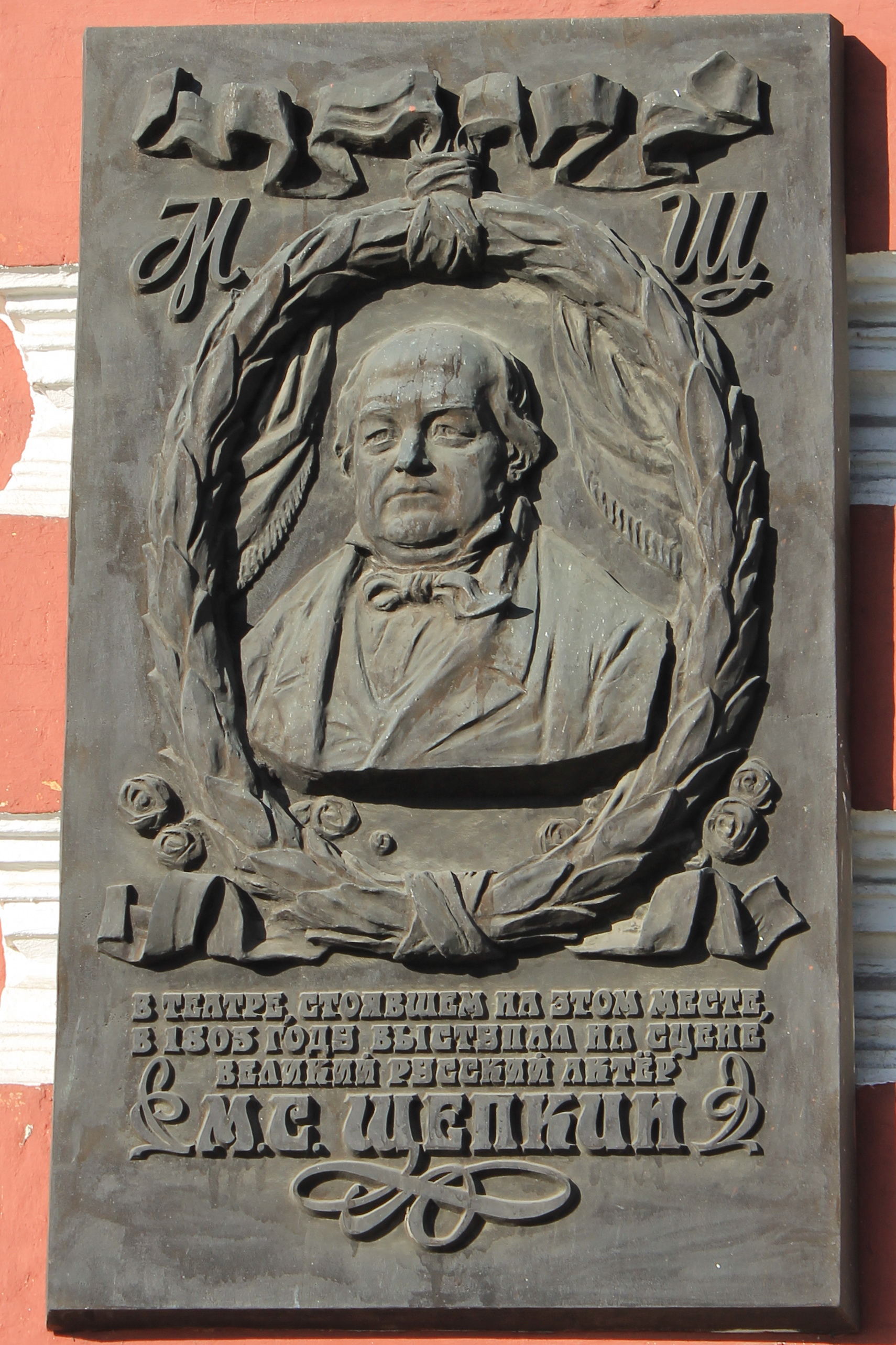 Мемориальная доска Щепкину М. С. на стене здания бывшего Дворянского собрания в Курске